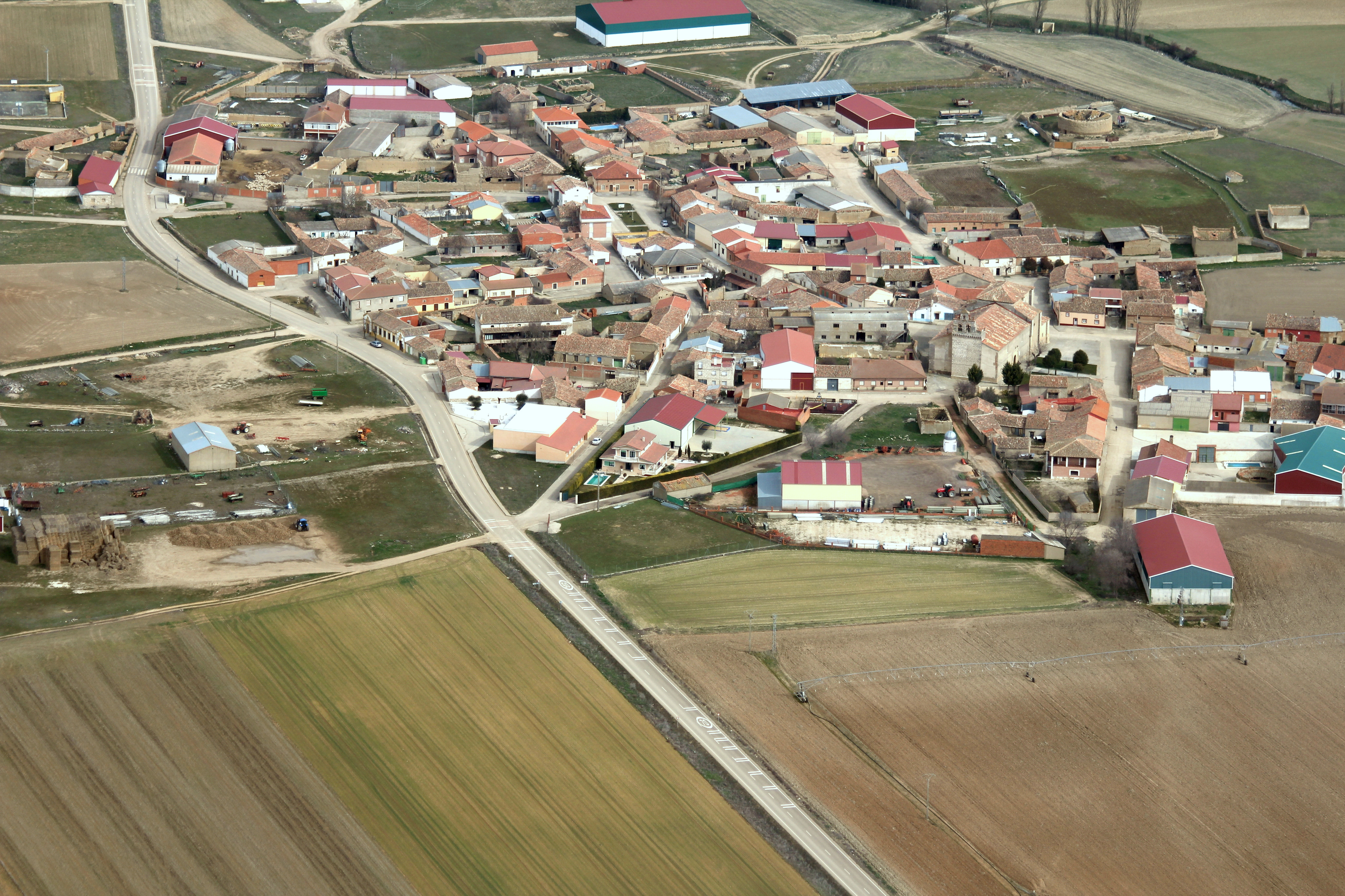 Villalbarba vista aérea